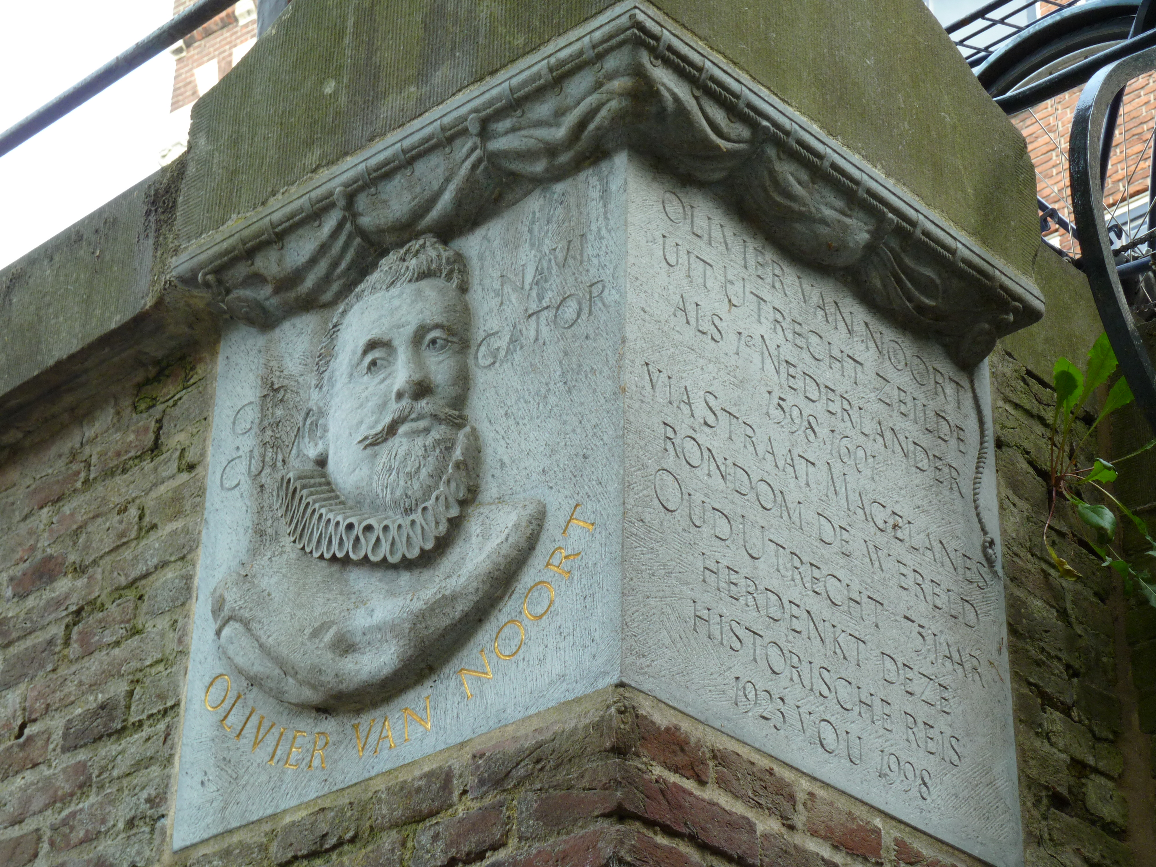 Straatlantaarnconsole bij Oudegracht 308, Utrecht, NL. Olivier van Noort